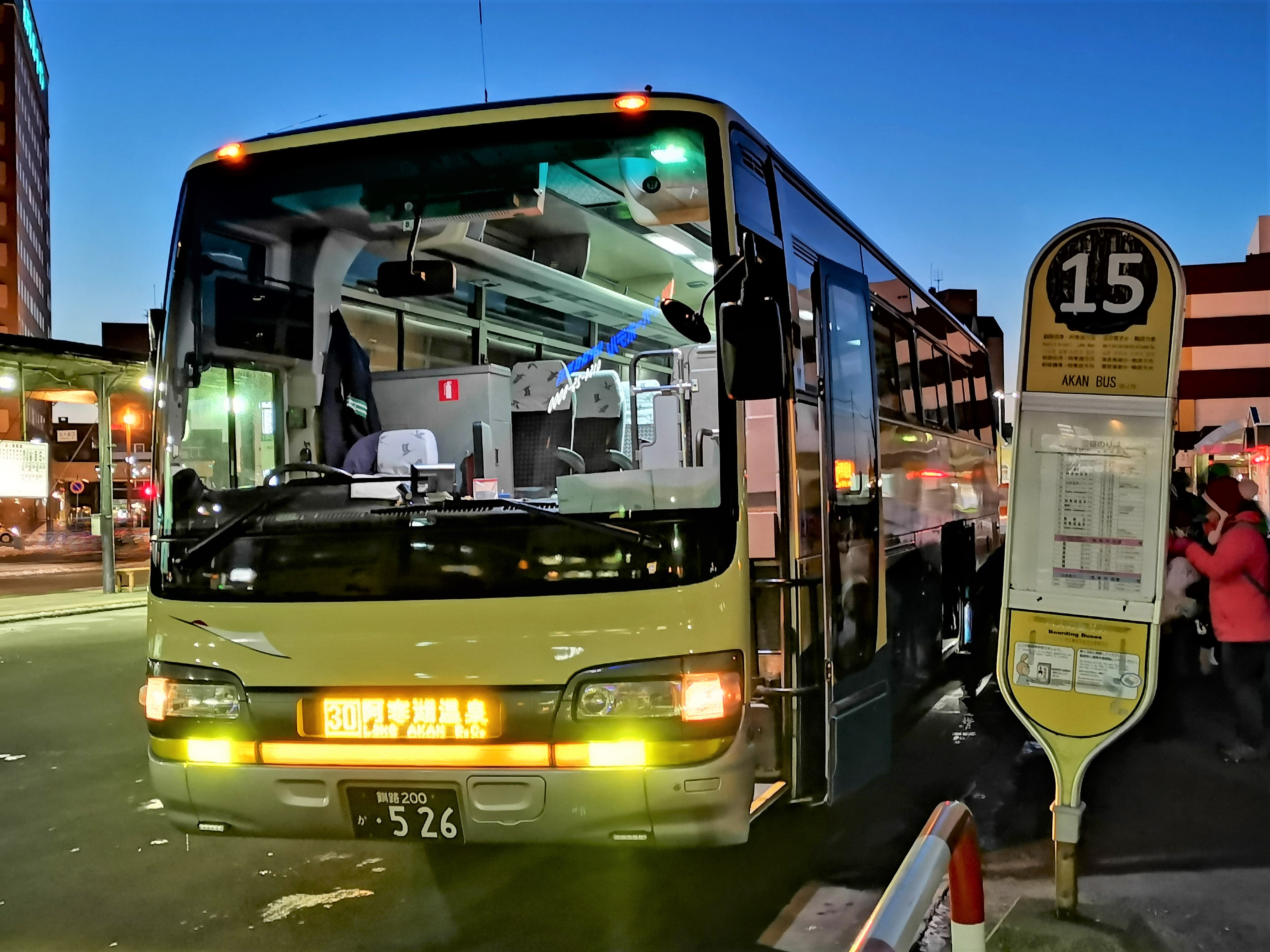 釧路駅前バスターミナルにて 観光客向けに貨物室がある車両を運用に充てることがある